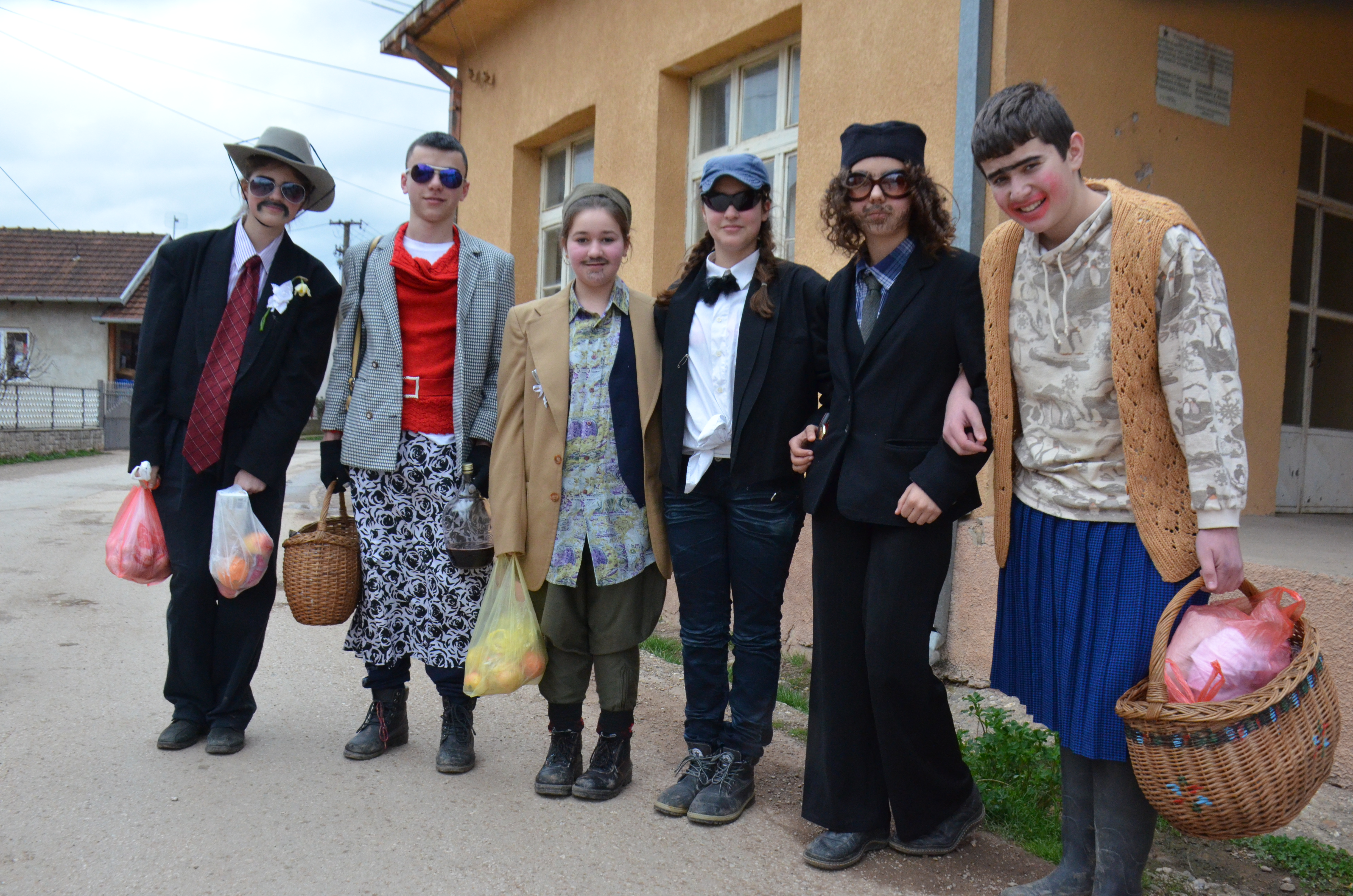 Српски (ћирилица): Маскирана поворка - "Комендије" у селу Забрега код Параћина